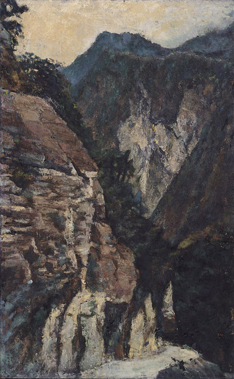 李梅樹作品：太魯閣(一)，1968，油彩 畫布。